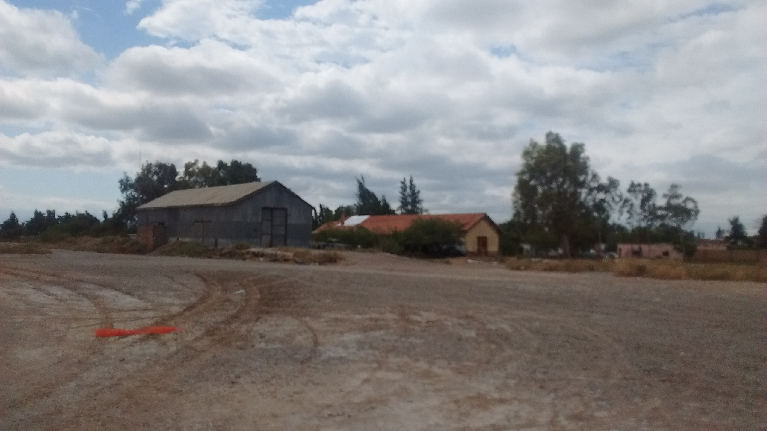 Estación Albardón (FCGB) vista desde atrás.